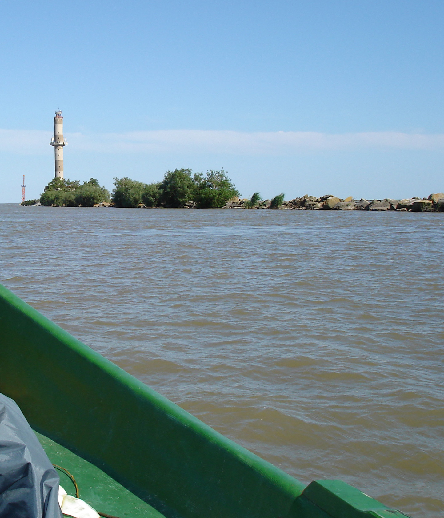 Phare actuel de Sulina (Mer Noire, Roumanie)